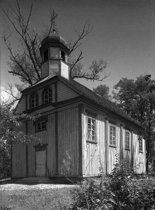 Беларуская (тарашкевіца): Ахова (Achova). Царква